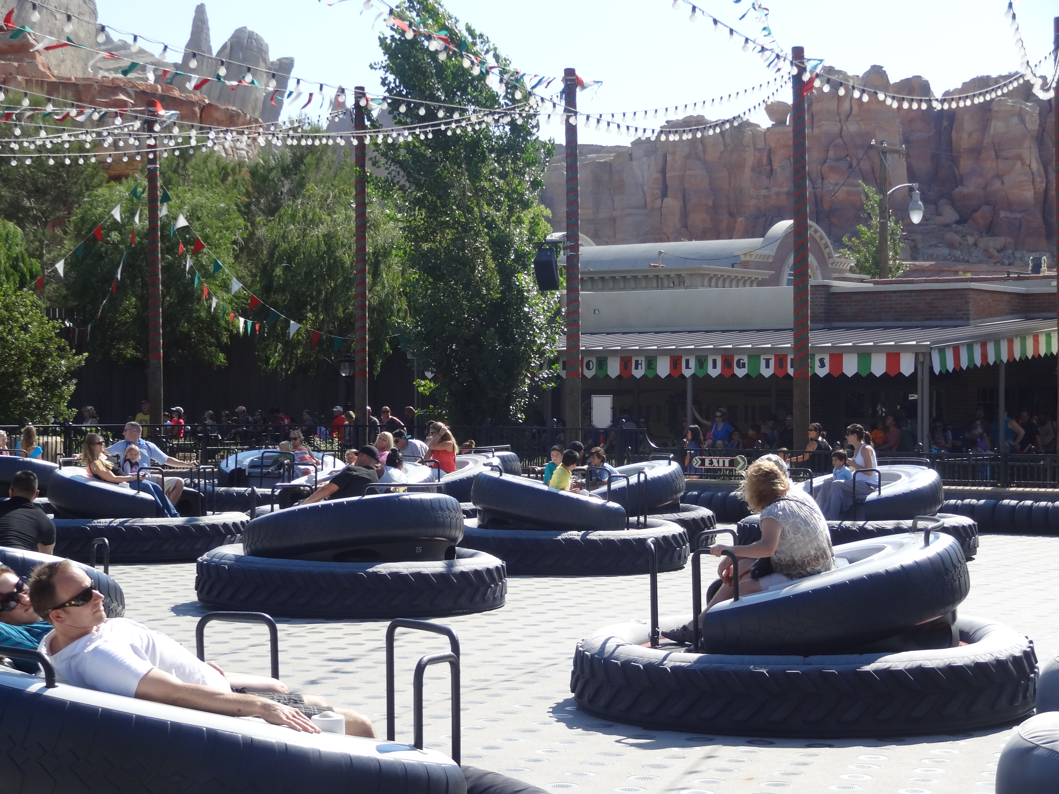 Luigi's Roamin' Tires à Disney Califonia Adventure.